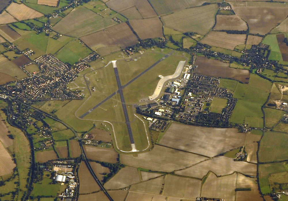 MSN 33643 B737-8AS RYANAIR LONDON FLIGHT BVA-DUB